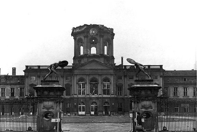 Berlin nach den Terror-Angriffen vom 22. und 23.11.43 Das Charlottenburger Schloss ist fast in seiner ganzen Ausdehnung durch Spreng- und Brandbomben vernichtet. Aufnahme: Güll-PBZ [Presse-Bild-Zentrale]